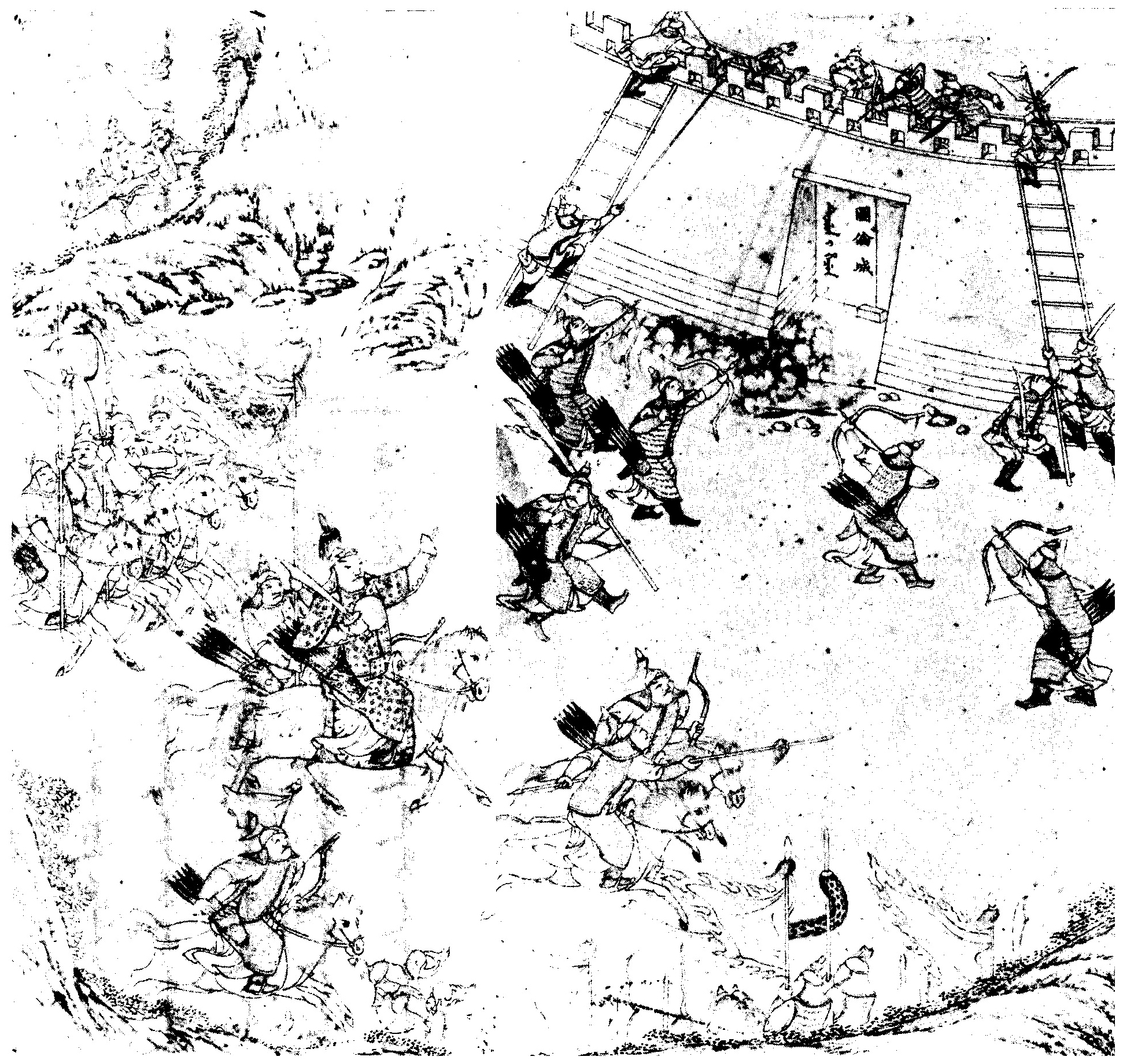 弩尔哈齐初举下图伦